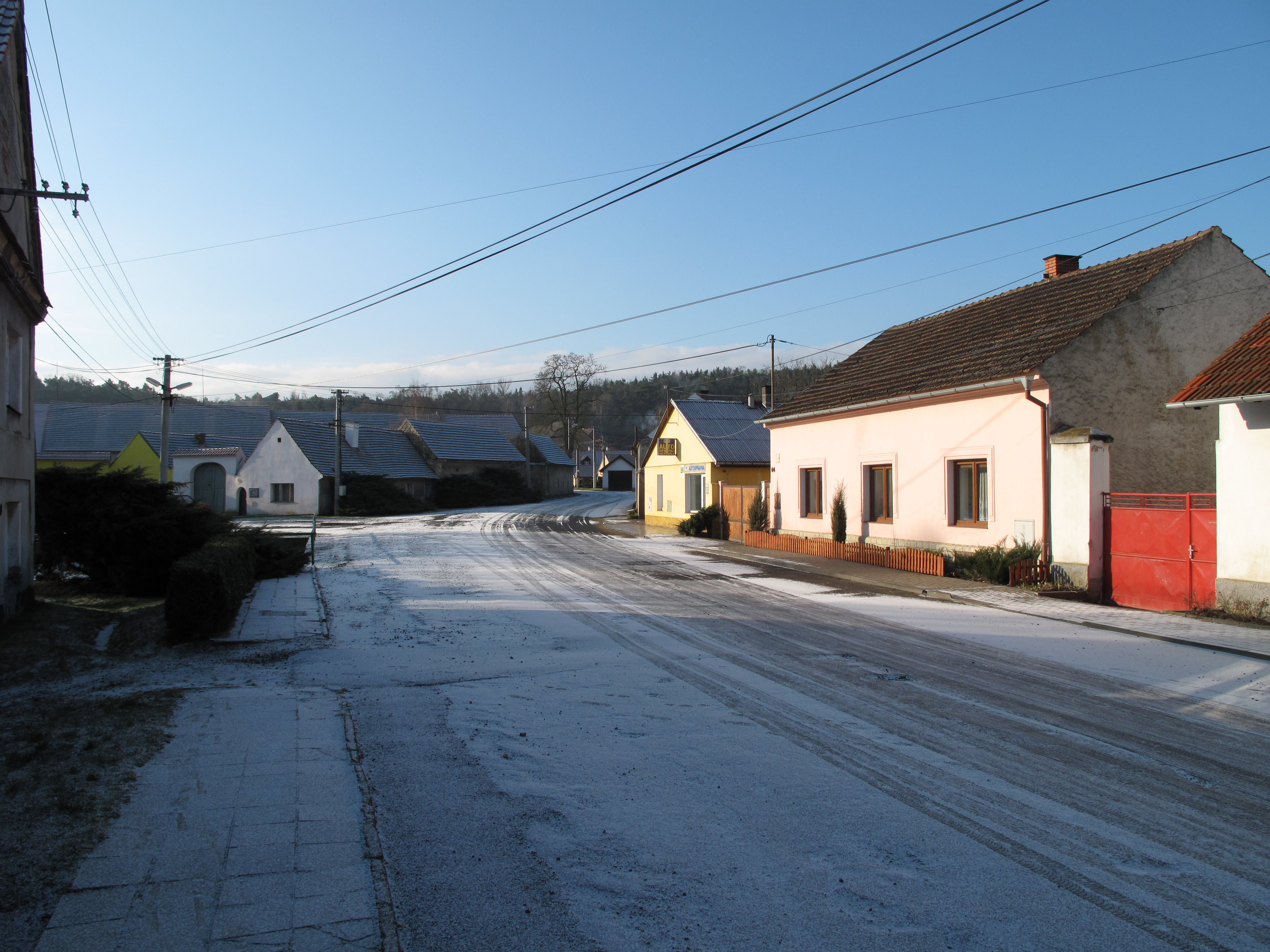 Ulice v Přestavlcích. Okres Litoměřice, Česká republika.